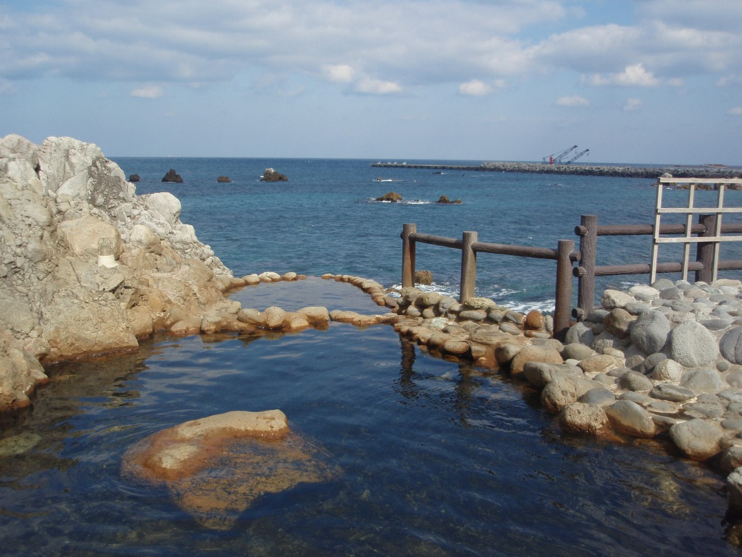 新島温泉露天風呂